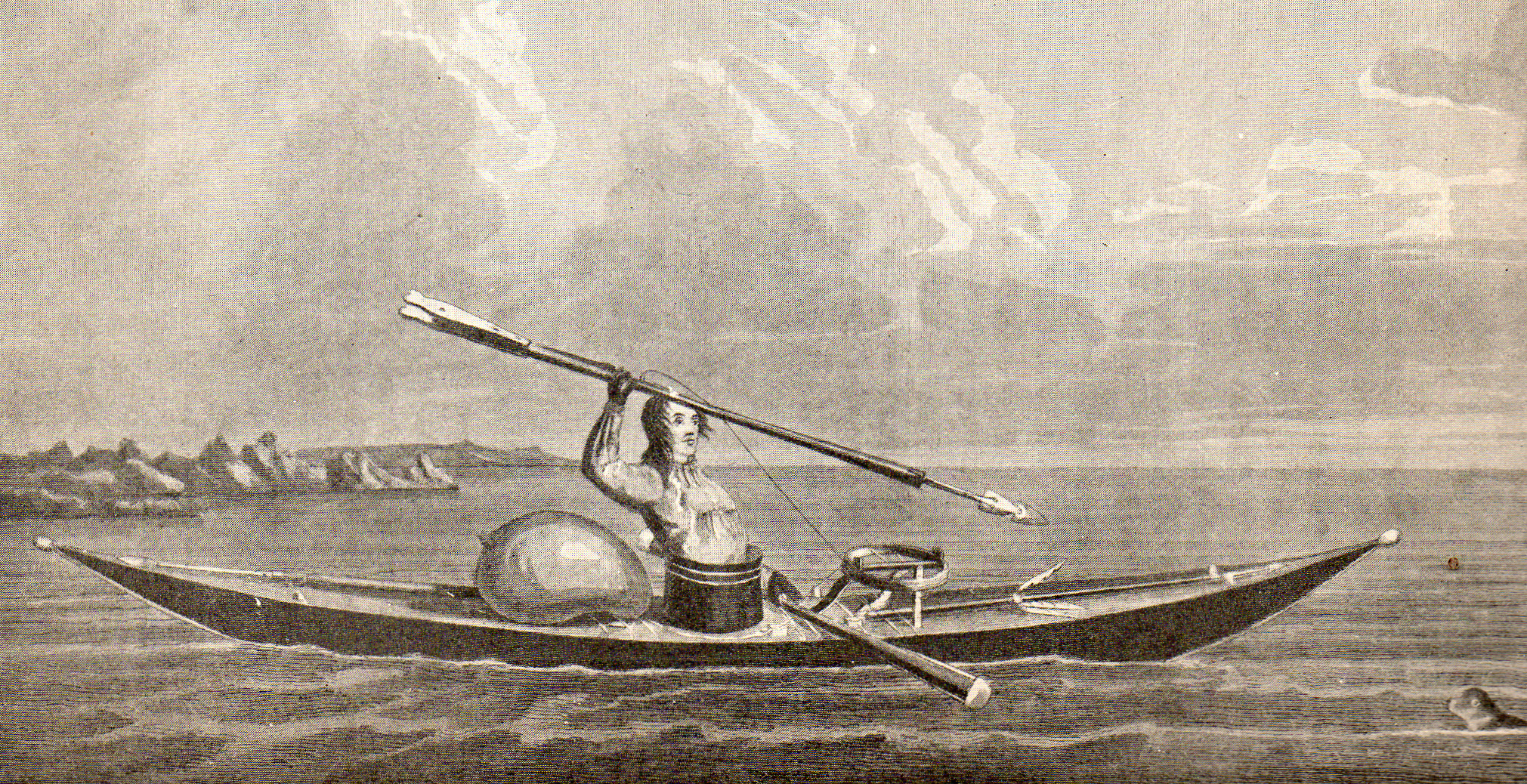 Grønlandsk fangerkajak omkring 1830.